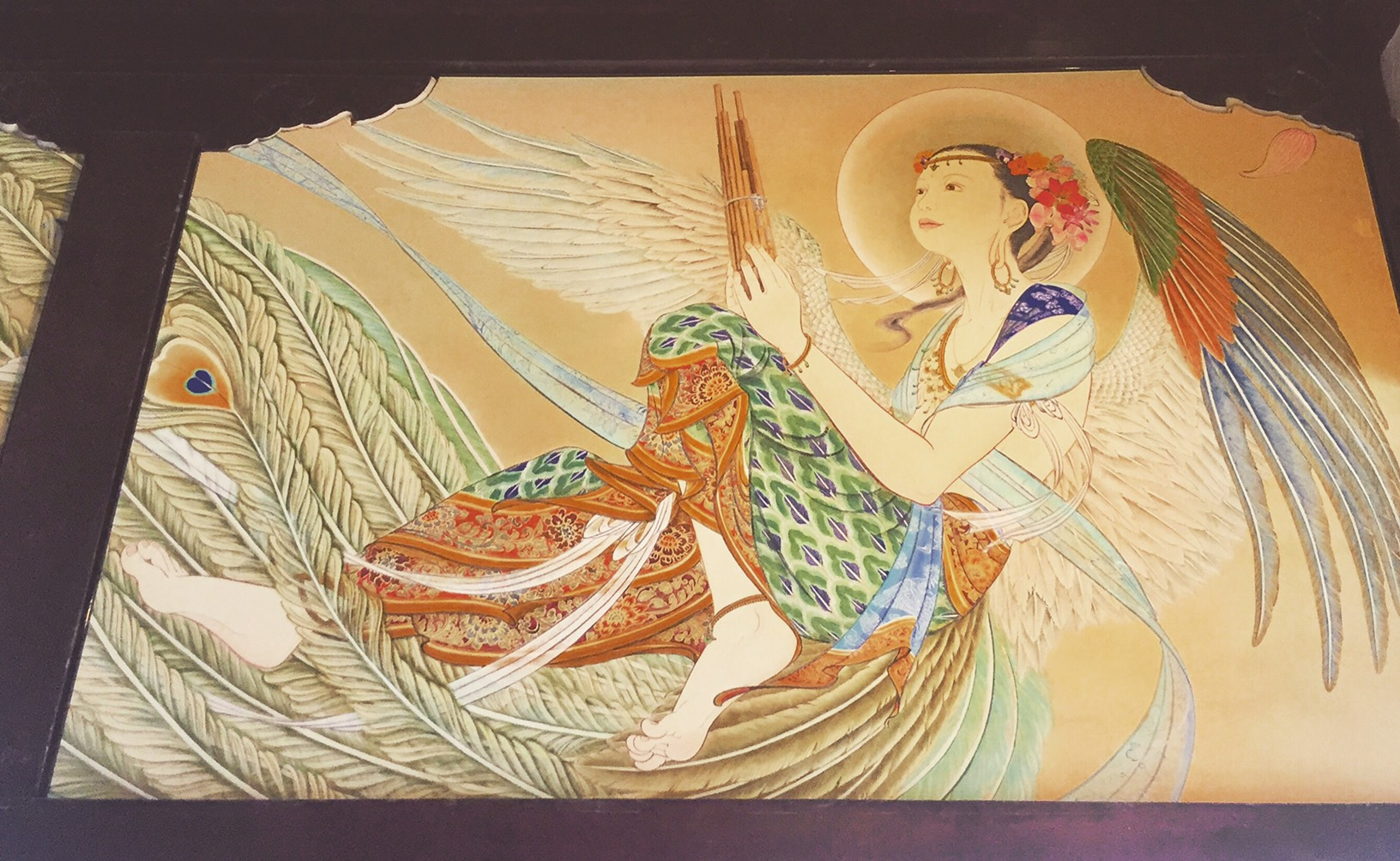 仏画師によって描かれる